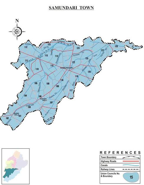 پنجابی: تحصیل سمندری دیاں یونین کونسلاں